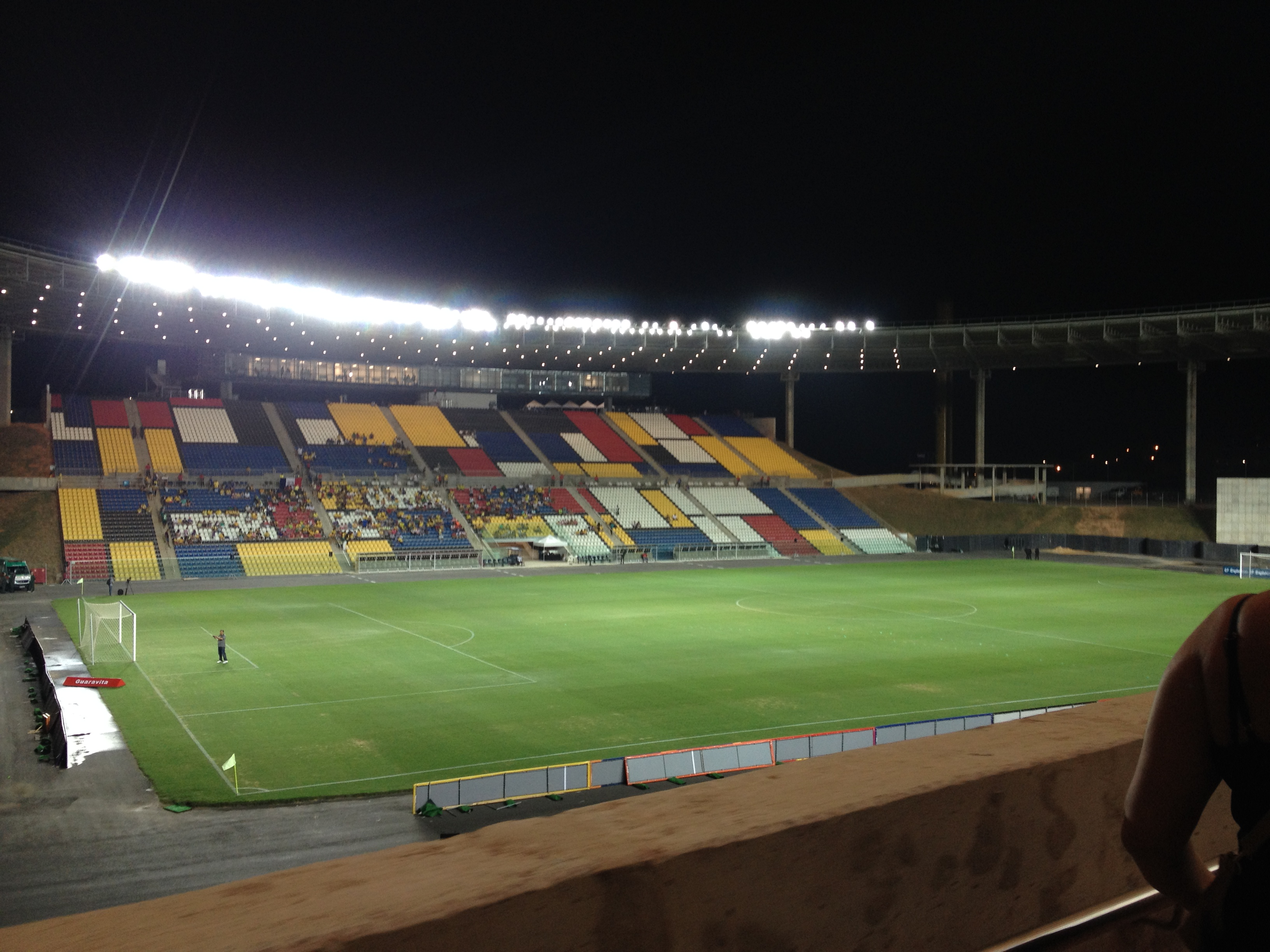 Imagem do Estádio Kleber Andrade no dia 27/03/2015